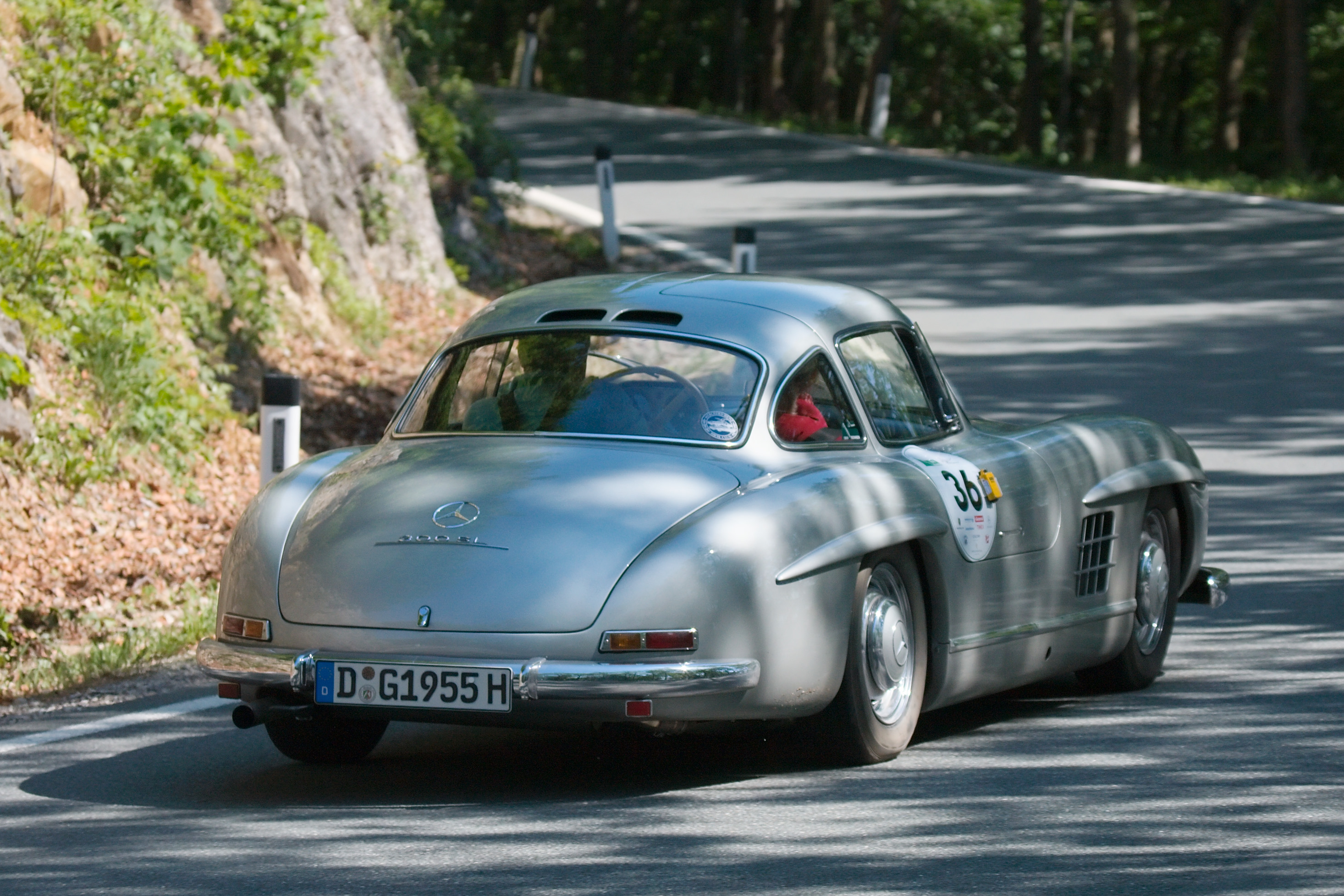 Mercedes-Benz 300SL Gullwing Coupe at Gaisbergrennen 2009